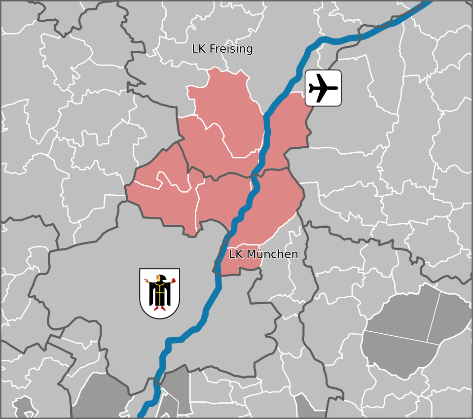 Lage der Gemeinden der Nordallianz in Bayern, Deutschland.